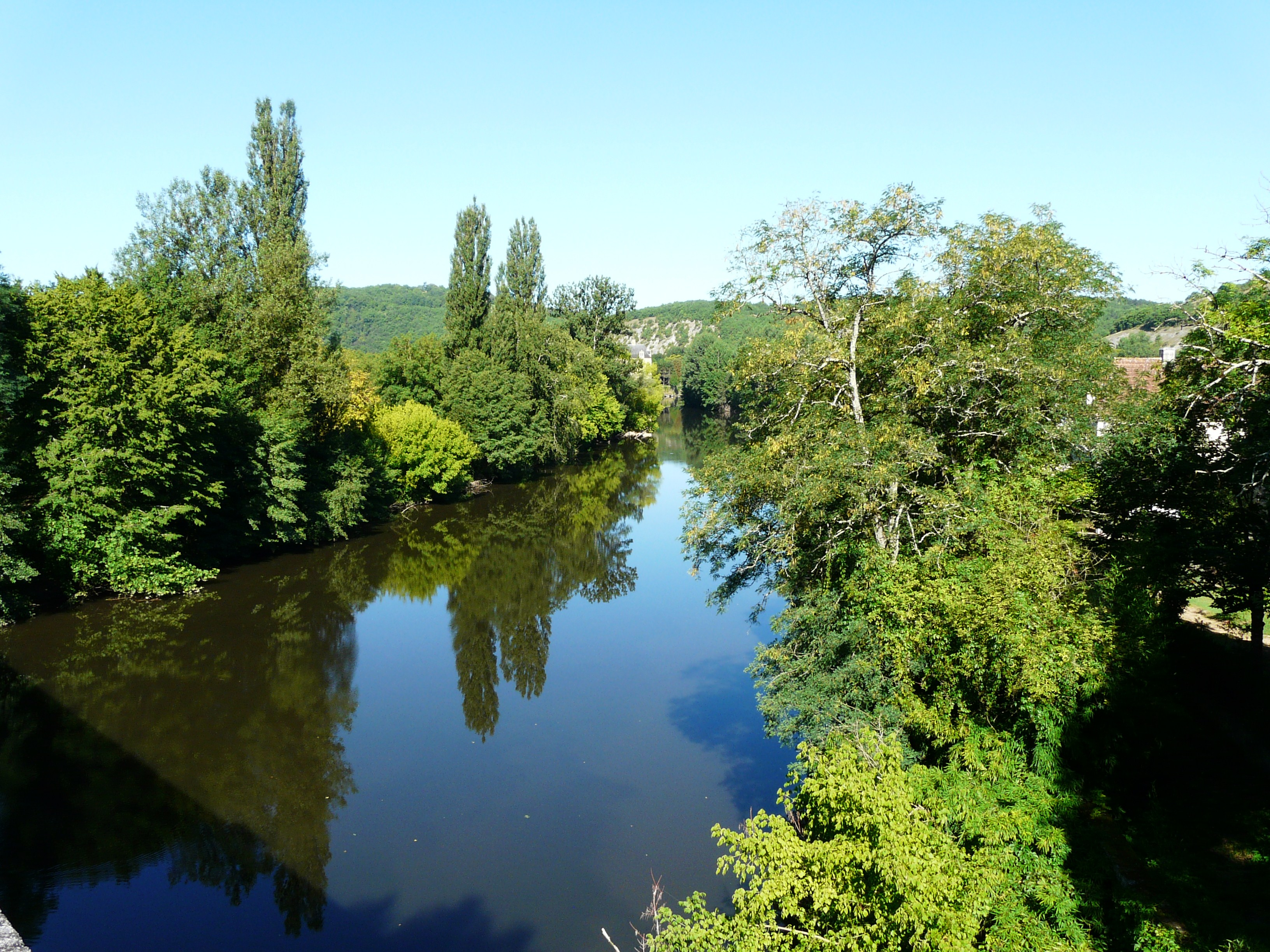 La Vézère (vue vers l'aval) au pont de la Valade, entre Aubas (à gauche) et Condat-sur-Vézère (à droite), Dordogne, France